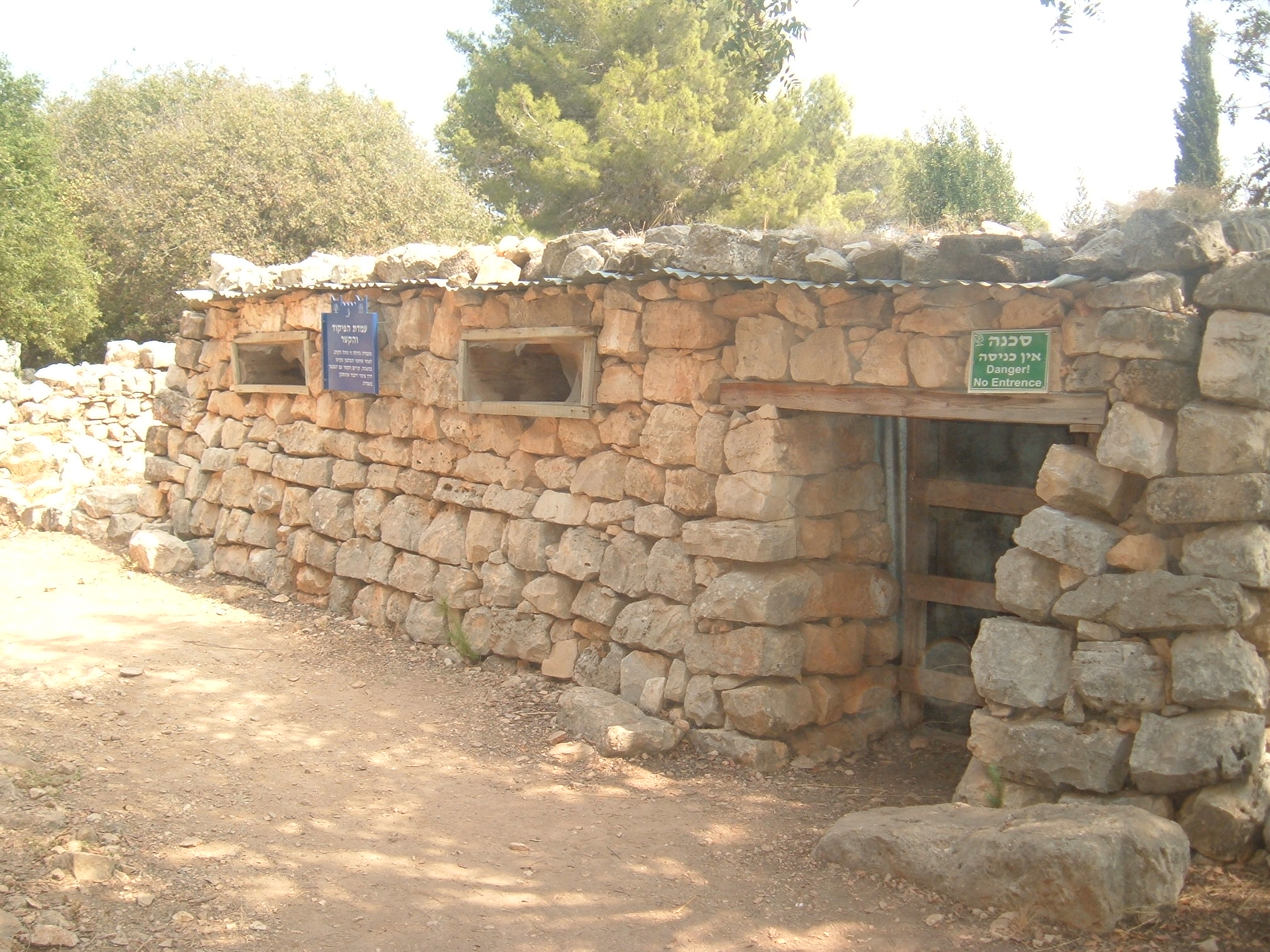 I.D.F. comand post from the war of independence, situated in the crusader's fort of Kala't Jedin (Mezudat Yechiam)עמדת פיקוד של צה"ל במתחם המבצר הצלבני קלעת ג'דין (מצודת יחיעם)